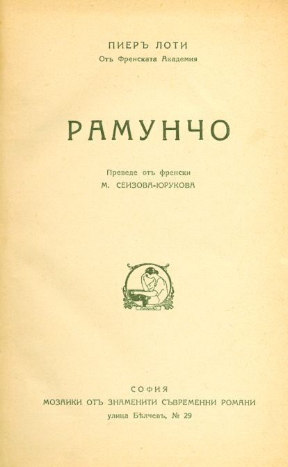 Титулна страница на българското издание на романа "Рамунчо" на Пиер Лоти (1850-1923). Романът е от 1897 г. Българското издание е от 1932 г. (София - Печатница "Гладстонъ").